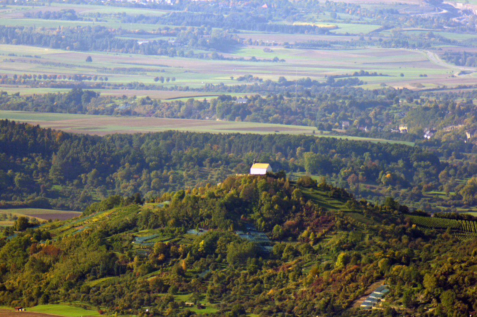 Der Wurmlinger Kappellenberg im LKR Tübingen